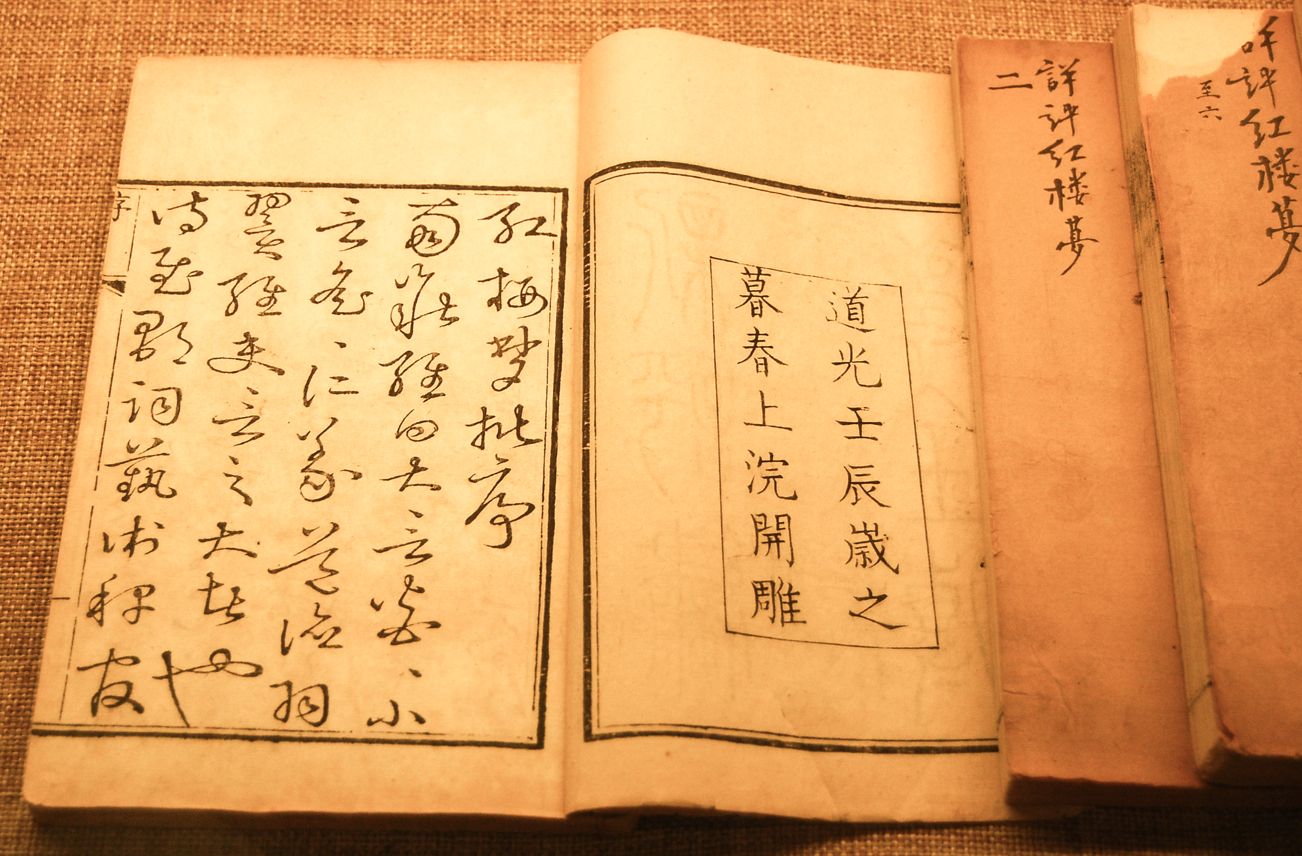 高月谭详评红楼梦，摄于颐和园